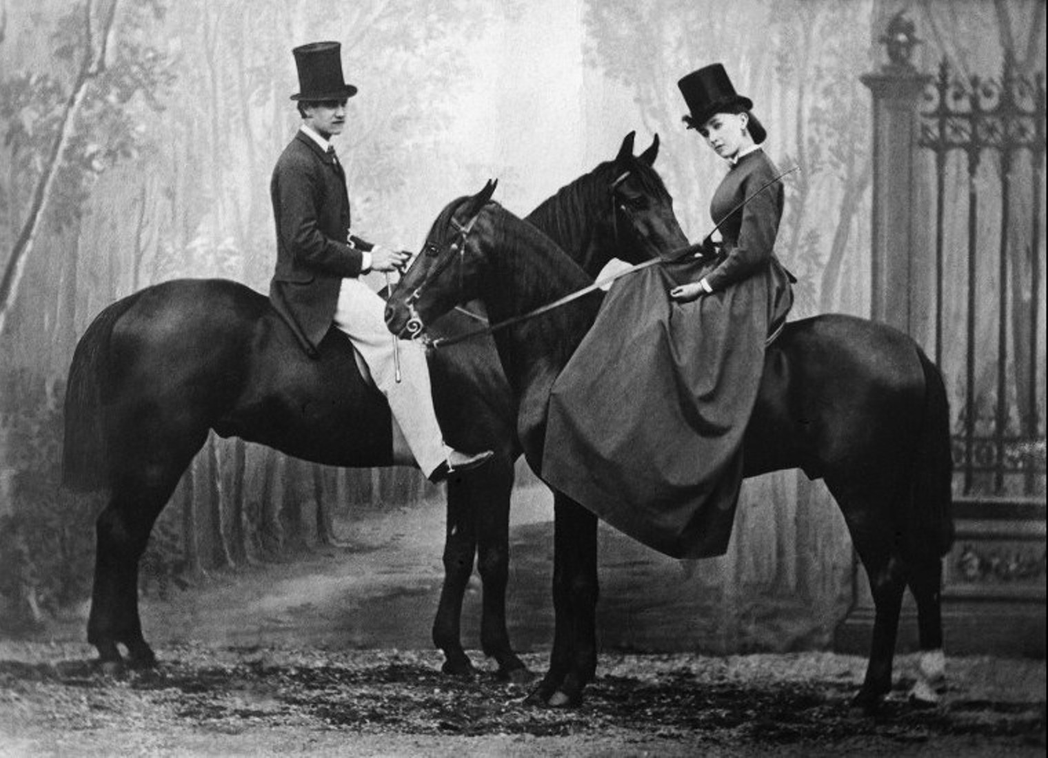 Sous le Second Empire, le prince Achille Murat (1847-1895), fils du prince Lucien Murat est épris de la courtisane Cora Pearl (1835-1886). Il lui aurait promis un acte de donation de deux cent mille francs pour le jour de son mariage.